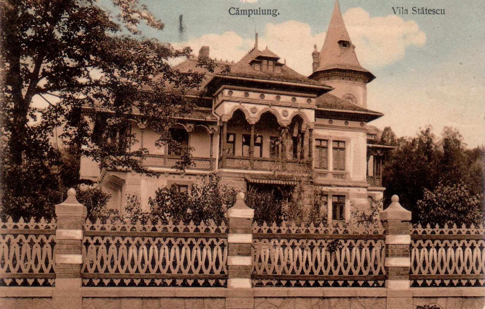 Carte poştală din 1911 reprezentând casa care i-a aparţinut lui Eugeniu Stătescu